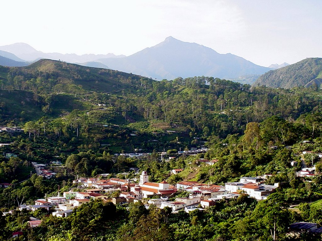 Panorámica de Torondoy